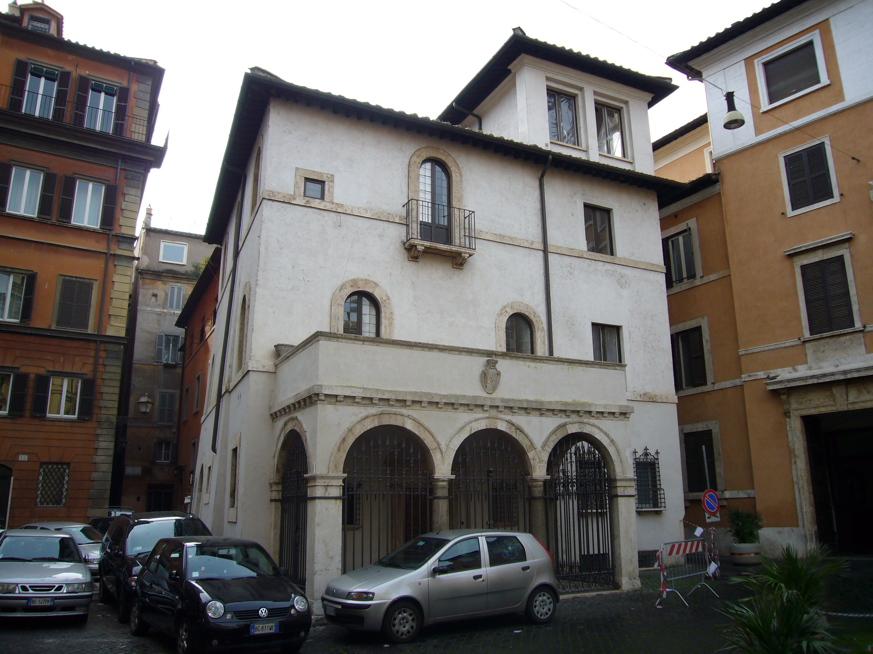 Roma, casa di Fiammetta Michaelis, cortigiana romana amante tra l'altro di Cesare Borgia a via Acquasparta presso piazza Navona (XV sec.)